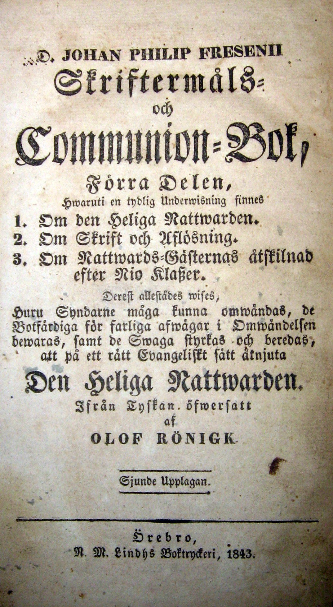 Johann Philipp Fresenii "Skriftemåls- och Communion-Bok", sjunde svenska upplagan.